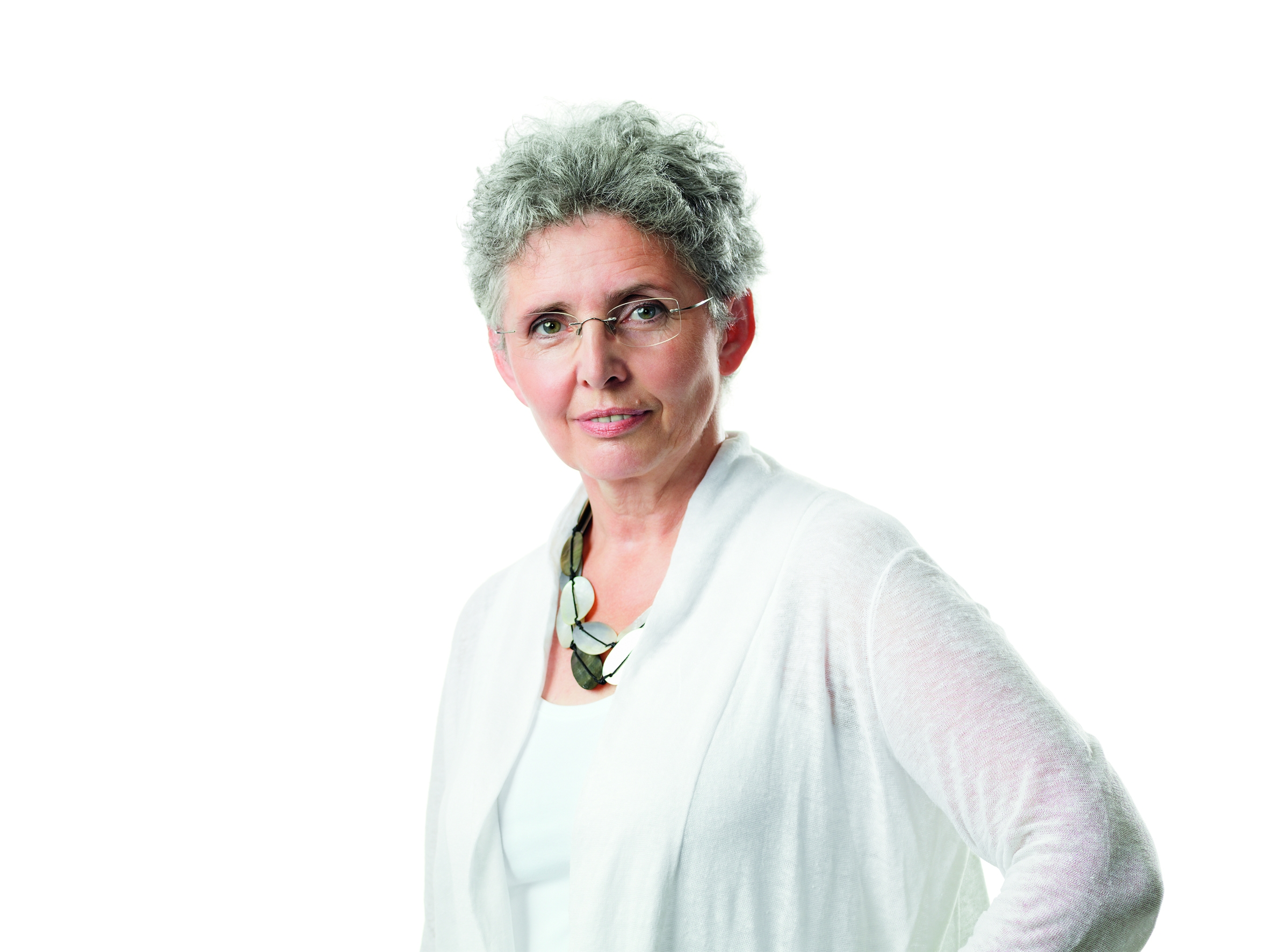 Ingrid Lechner-Sonneck, Landtagsabgeordnete der Grünen in der Steiermark